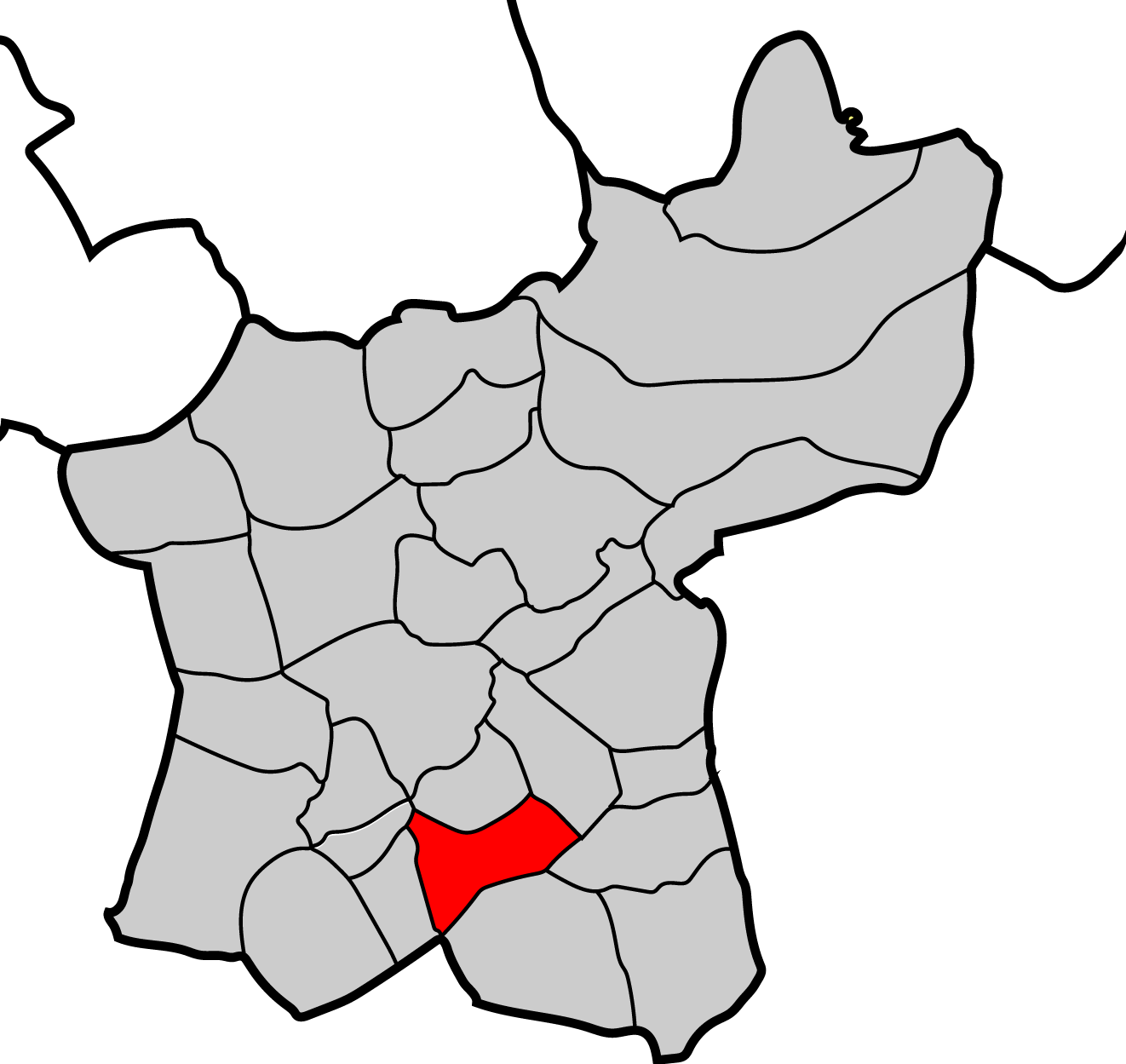 Mapa parroquia de Pol Baralla